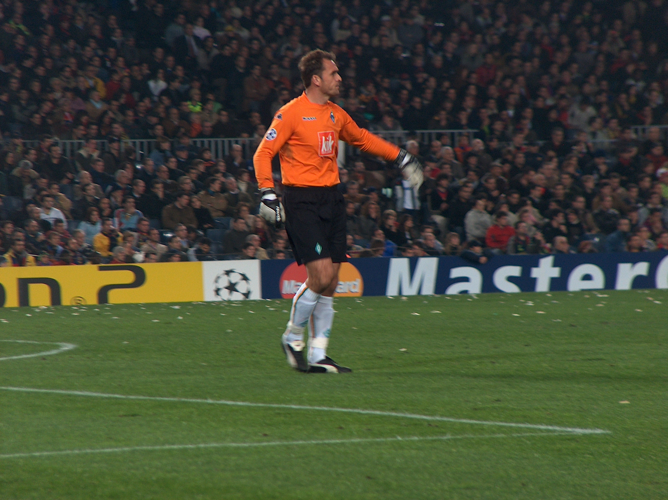 Andreas Reinke, porter del Werder Bremen. Camp Nou. FC Barcelona - Werder Bremen. (2:1).